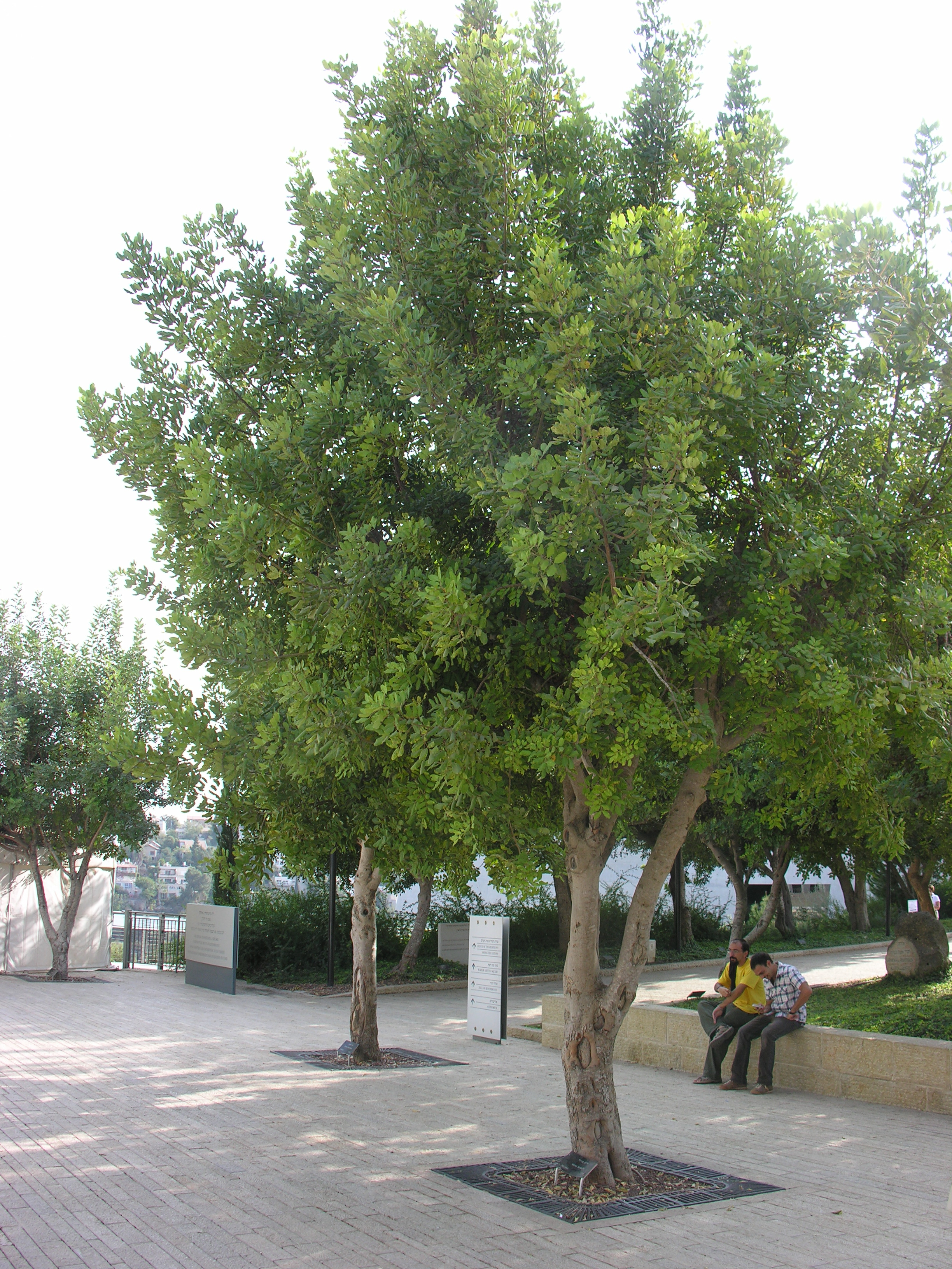 Drzewko Ireny Sendlerowej w Instytucie Yad Vashem